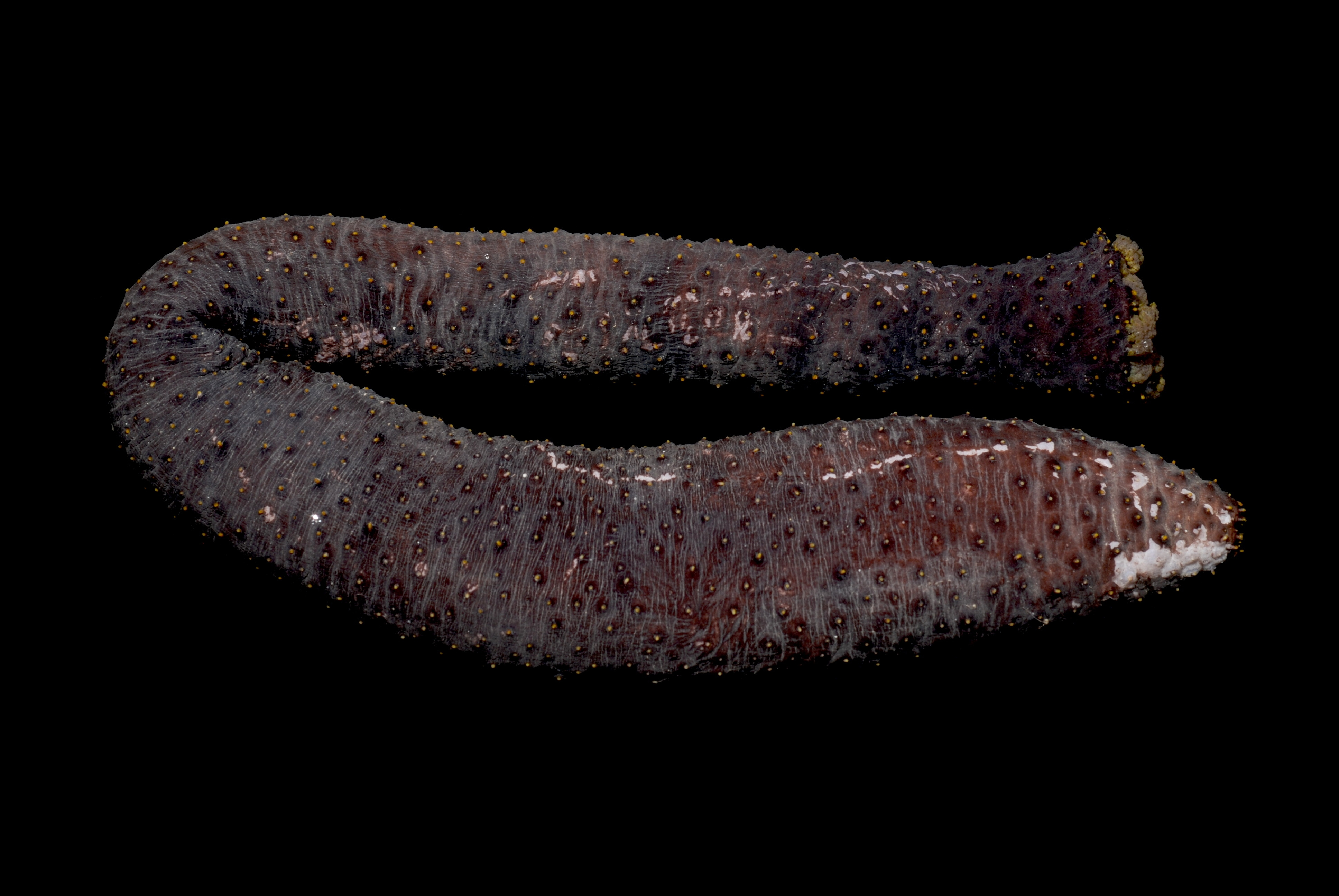 Holothuria flavomaculata. La Réunion.